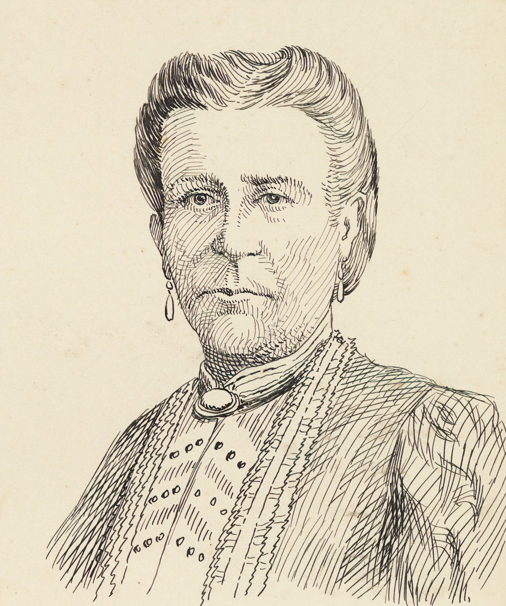 Adélia Fonseca